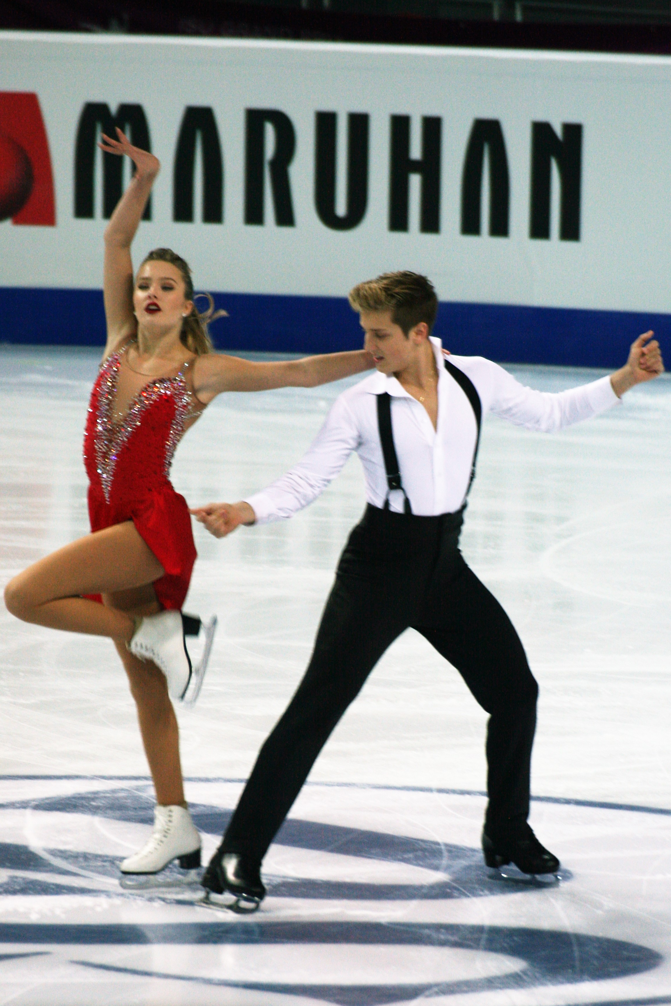 Кристина Каррейра / Энтони Пономаренко (США) на финале Гран-при по фигурному катанию среди юниоров 2016-2017